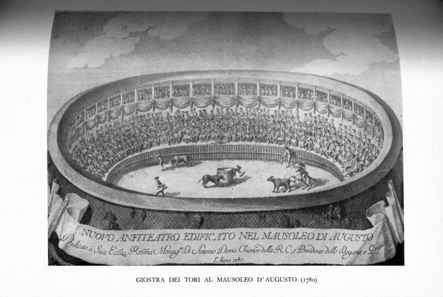 Roma, 1780: giostra dei tori al mausoleo di Augusto, detto il Corea (Anonimo)